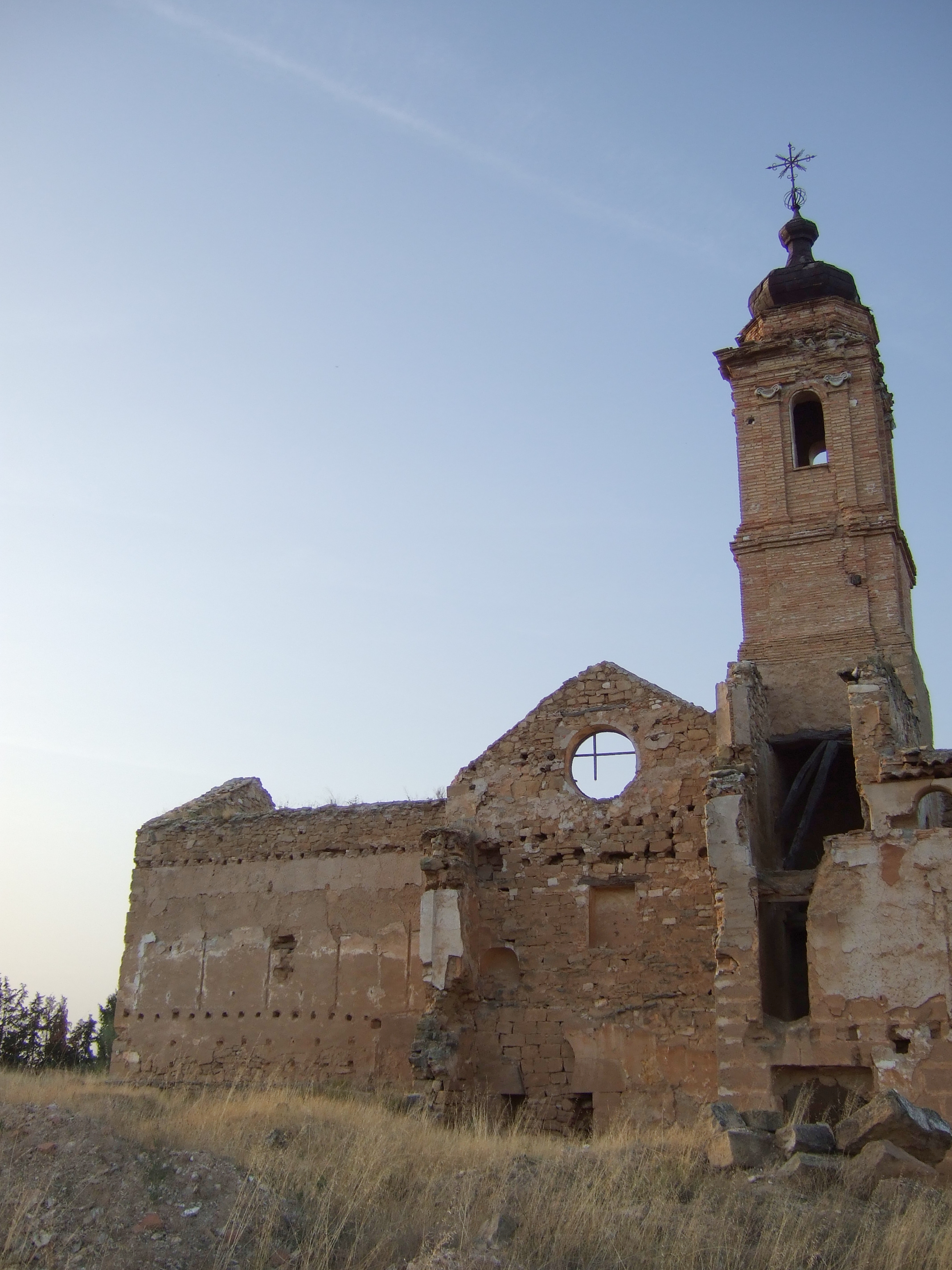 Maella - Antiguo priorato de Santa Susana en la Trapa